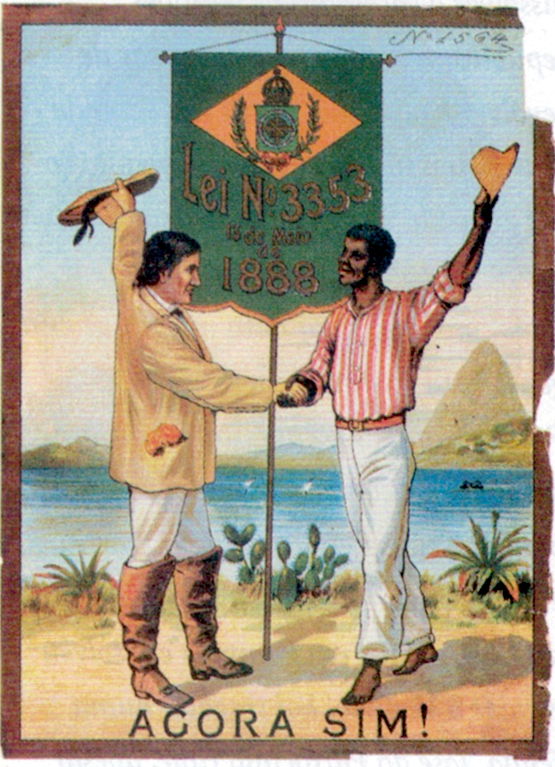 Cartaz, do acervo do Arquivo Nacional do Brasil, feito em 1888 por uma fábrica de tecidos em que mostra um cidadão branco e um cidadão negro se cumprimentando, com uma flâmula da Bandeira do Império do Brasil, pelo fim da escravidão do Brasil.